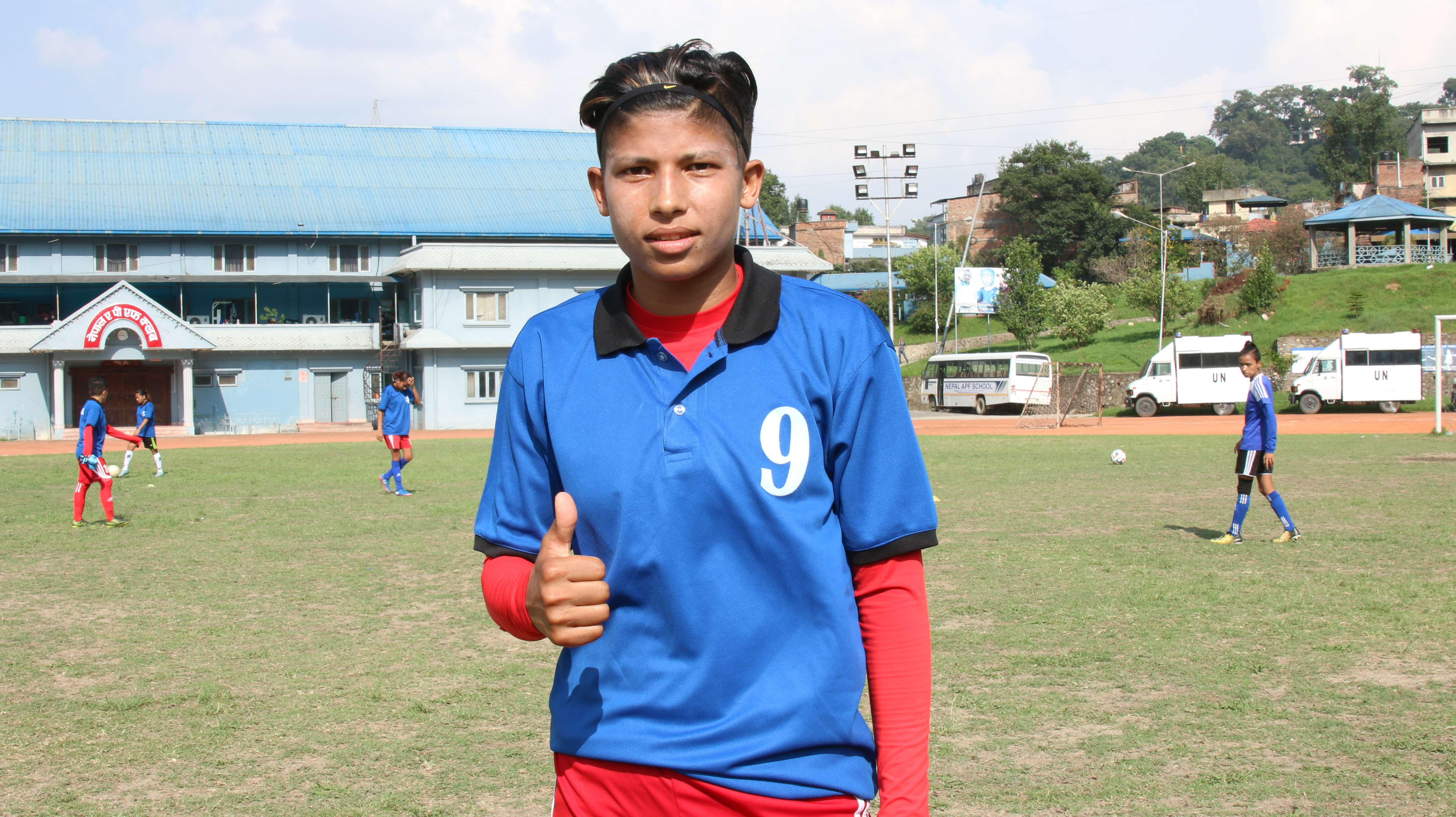 नेपाली: सावित्रा भण्डारी